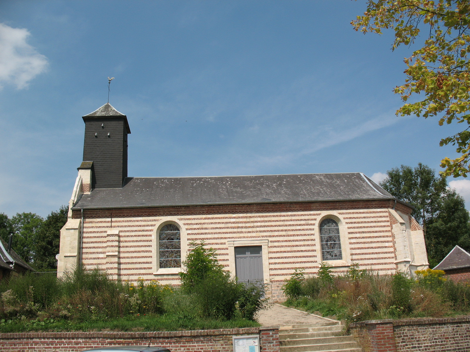 L'édifice datant des XIIIe et XIVe siècles, a subi plusieurs restaurations. Il est construit sur un plan rectangulaire avec une abside à trois pans. Les murs sont en calcaire et briques, appareillés en lits alternés.